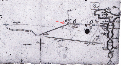 Kartierung des Danewerks, um 1720